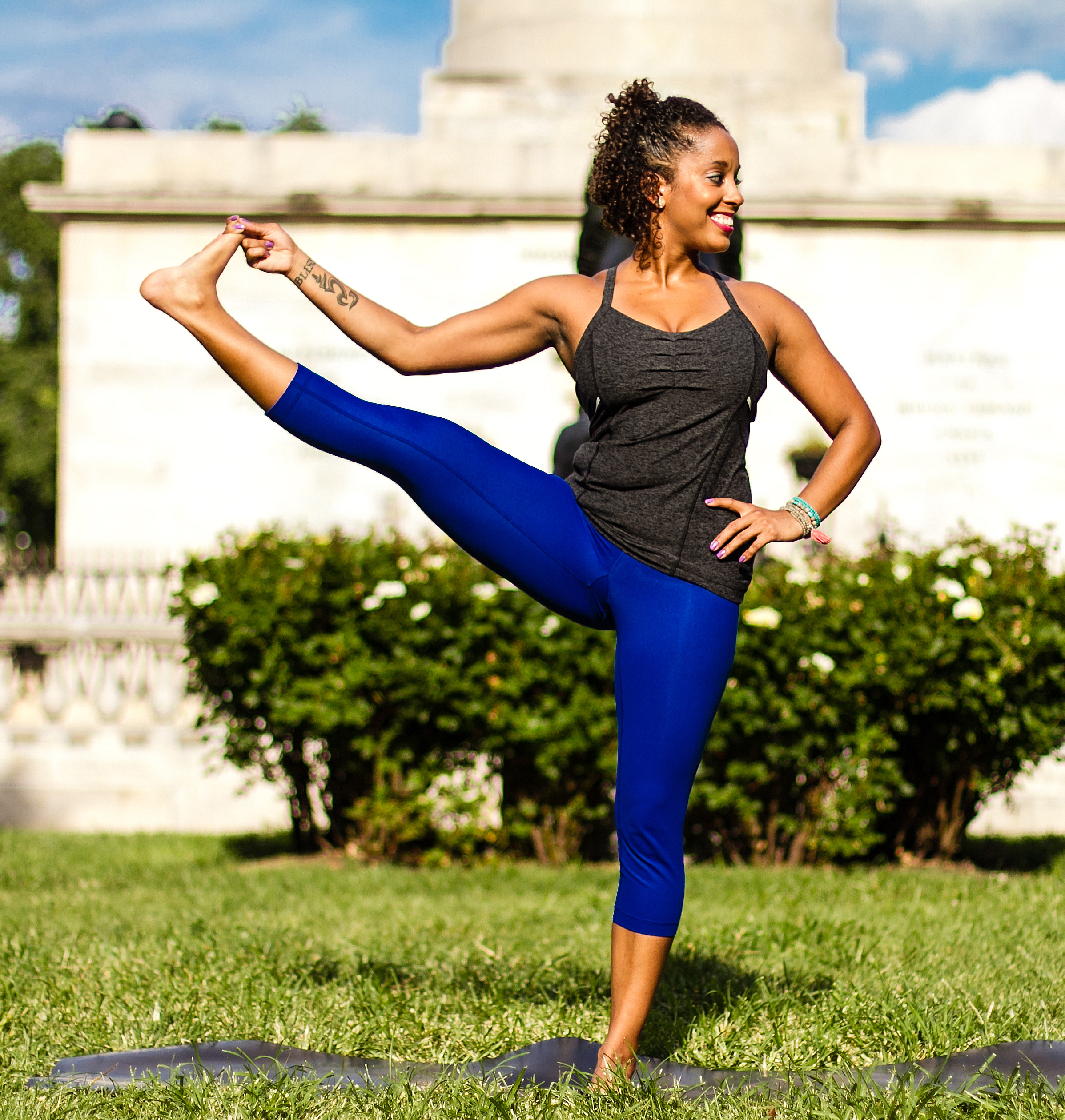 Utthita Padangusthasana II